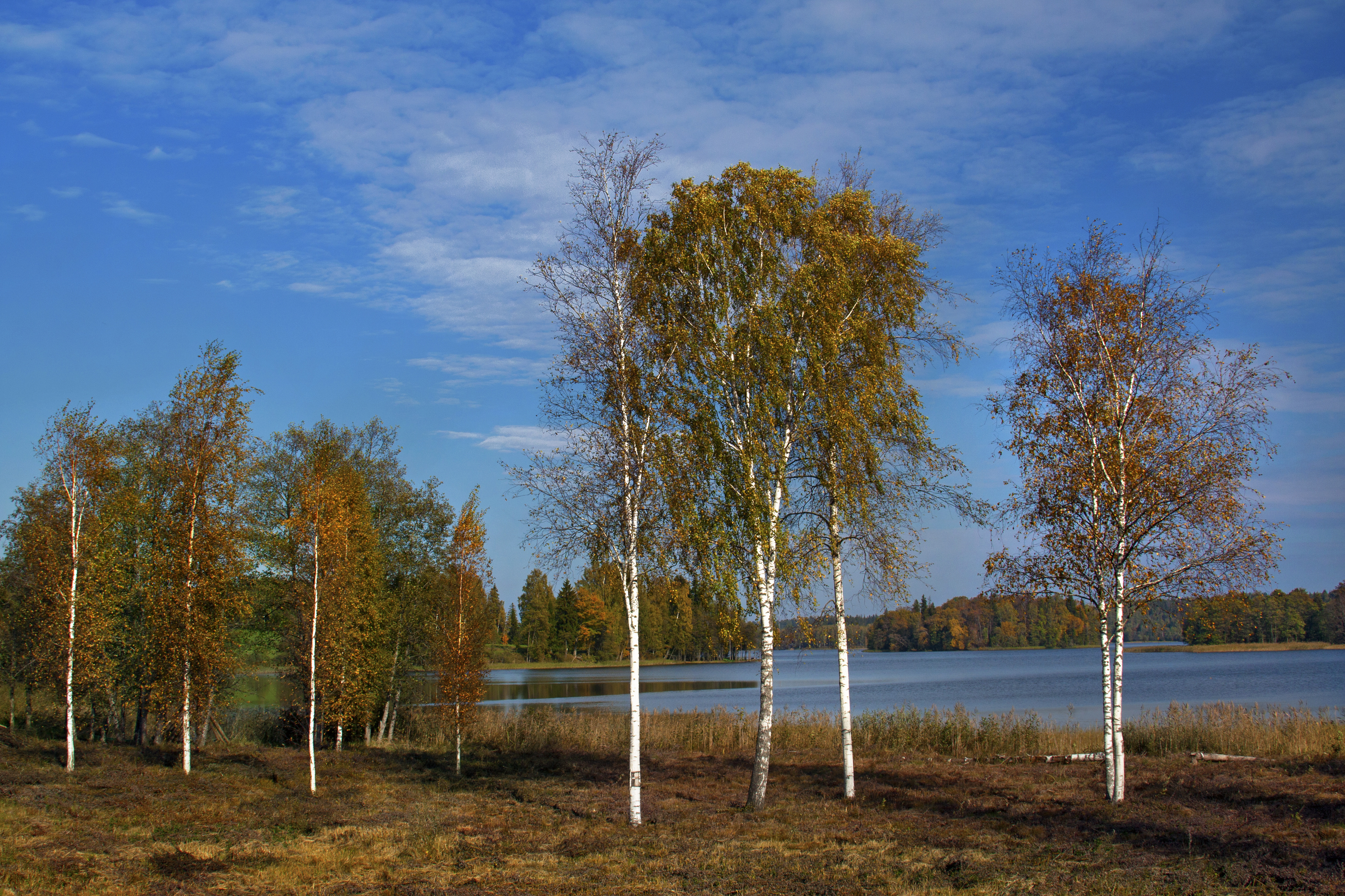 Pühajärve kaskedega kaldapealne